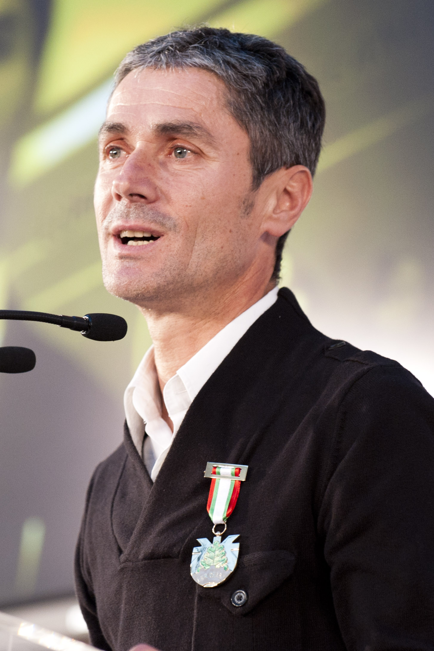 Martin Fiz recibiendo la distición Lan Onari (2011)